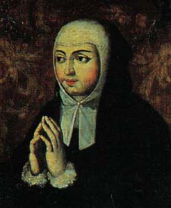 Summary Infanta de Portugal Licensing 19:56, 27 Fevereiro 2006 L Gonçalves 246x300 (25541 bytes) (Infanta de Portugal)